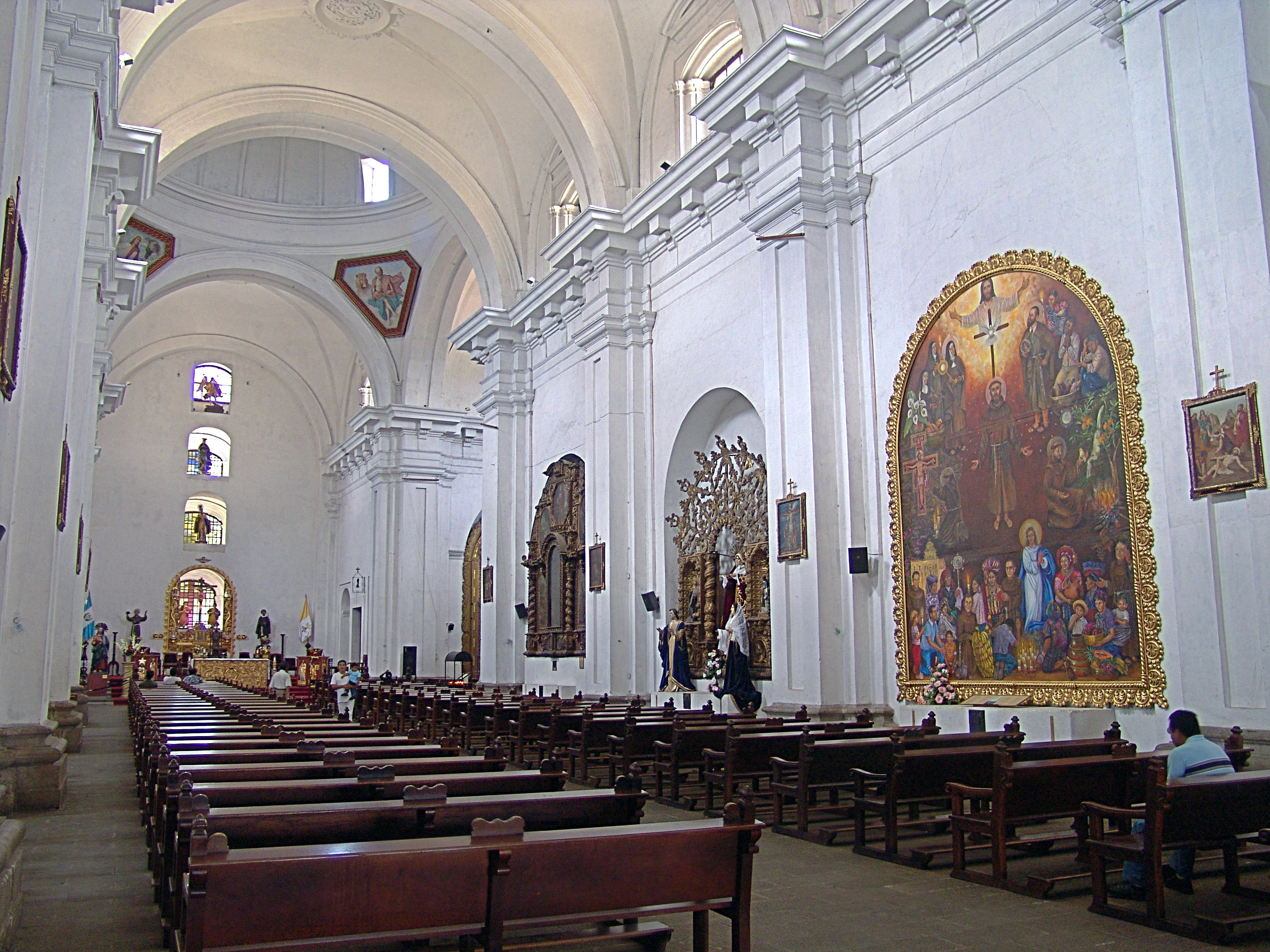 Iglesia de San Francisco en 2005